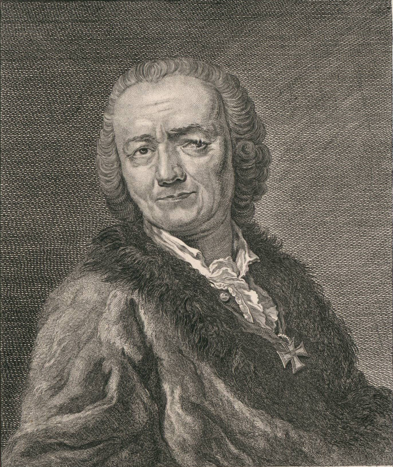 Portrait von Johann Karl von Hedlinger (1691-1771). Stich aus Lavaters «Physiognomische Fragmente zur Beförderung der Menschenkenntniss und Menschenliebe».